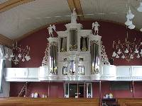 De voorzijde van het orgel van de Hervormde kerk van Vaassen (Foto: Wim van 't Einde)